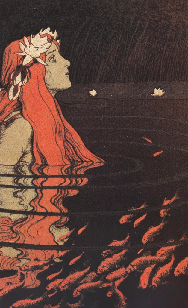 Франц Хайн. Русалка в пруду золотой рыбки.